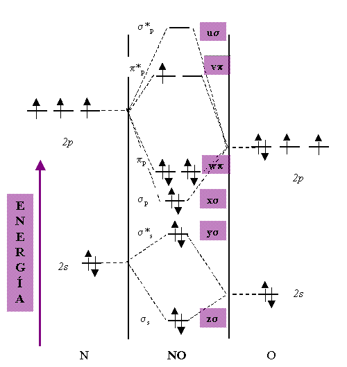 orbi